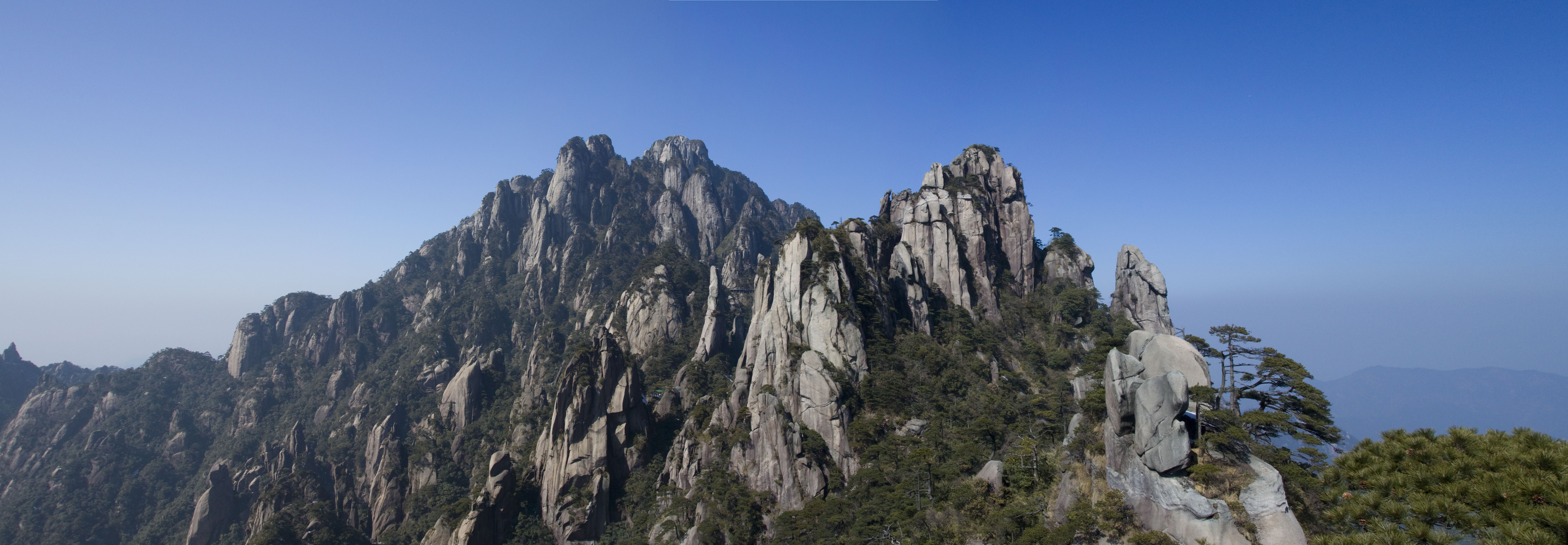 三清山